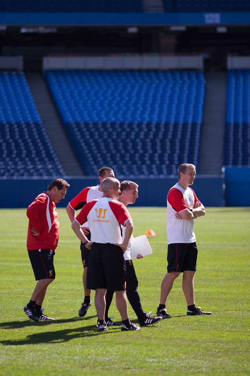 L-R: Colin Pascoe, Mike Marsh, Brendan Rodgers, Darren Burgess